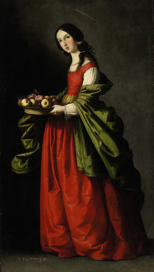 Santa Dorotea con un cesto de manzanas y rosas